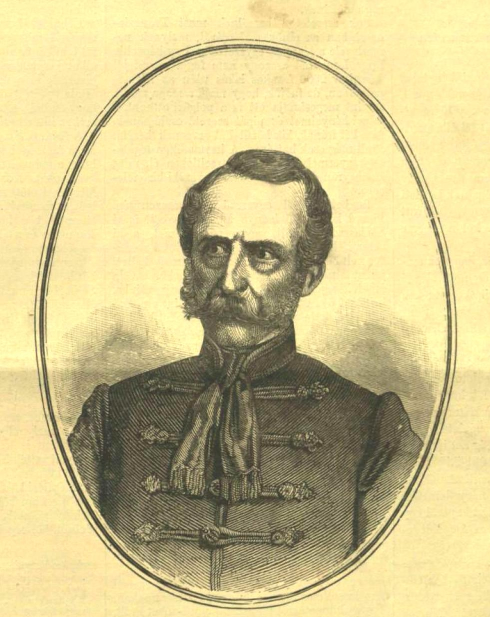 Apponyi György